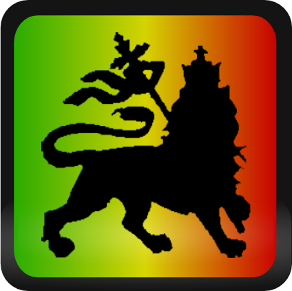 Image perso, faite avec The Gimp